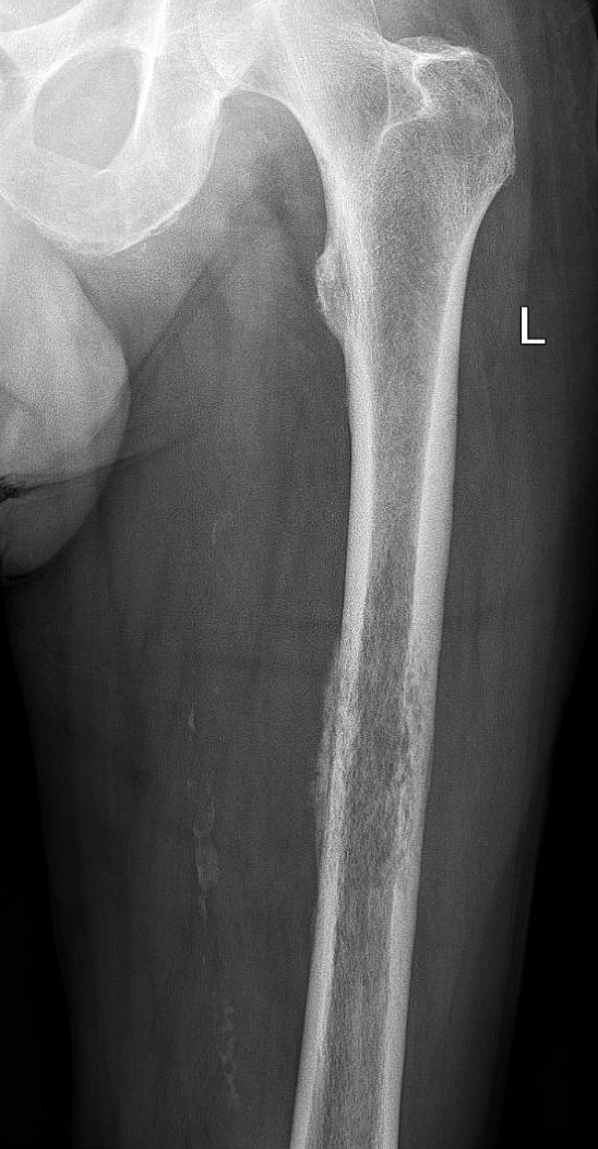 Lymphombefall des Knochens (Femur links). Typische Lodwick 3-Läsion. Deutliche Periostreaktion.